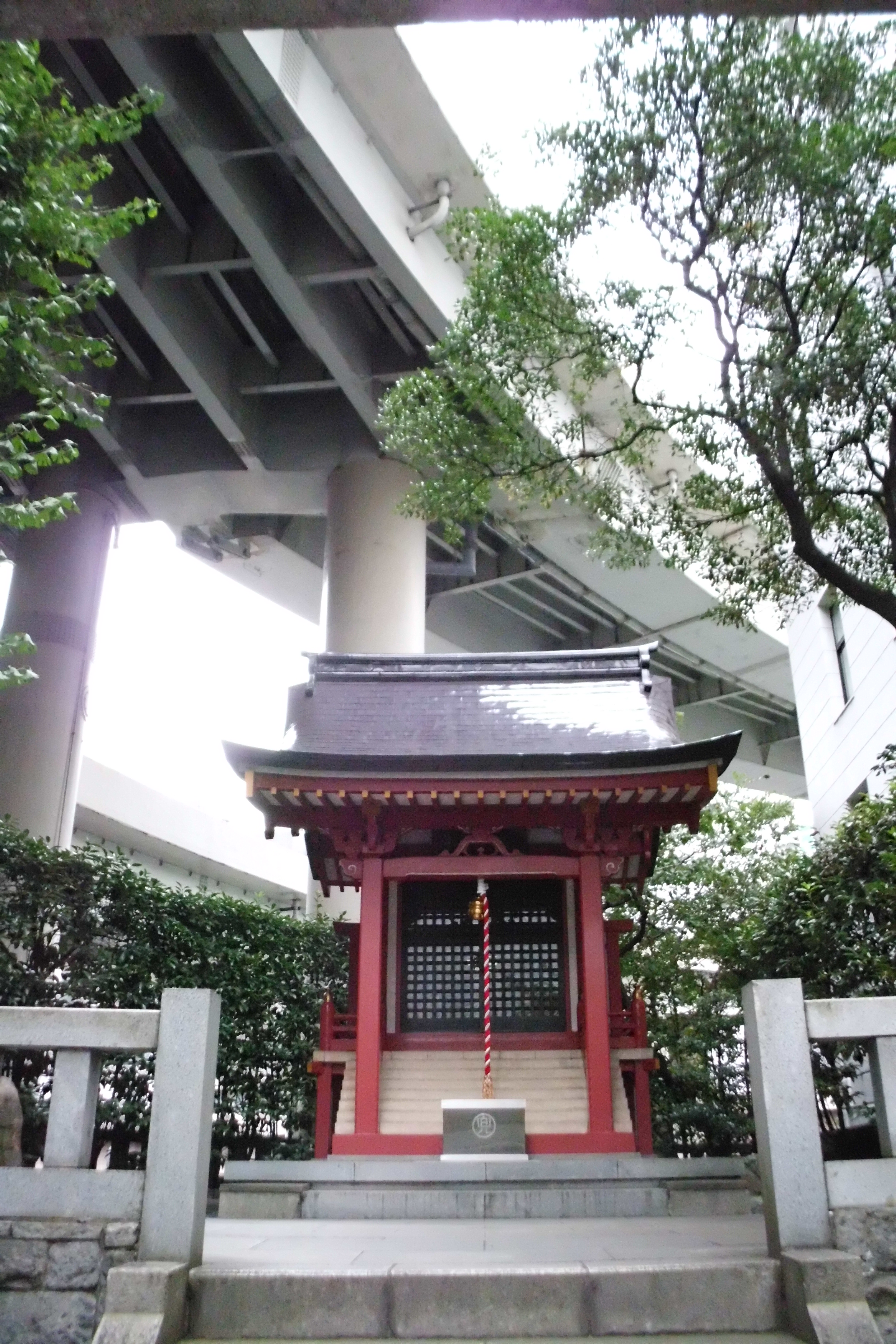 日本橋兜町の地名の由来となった兜神社。ビルの谷間、首都高速に覆われるようにひっそりと佇む。